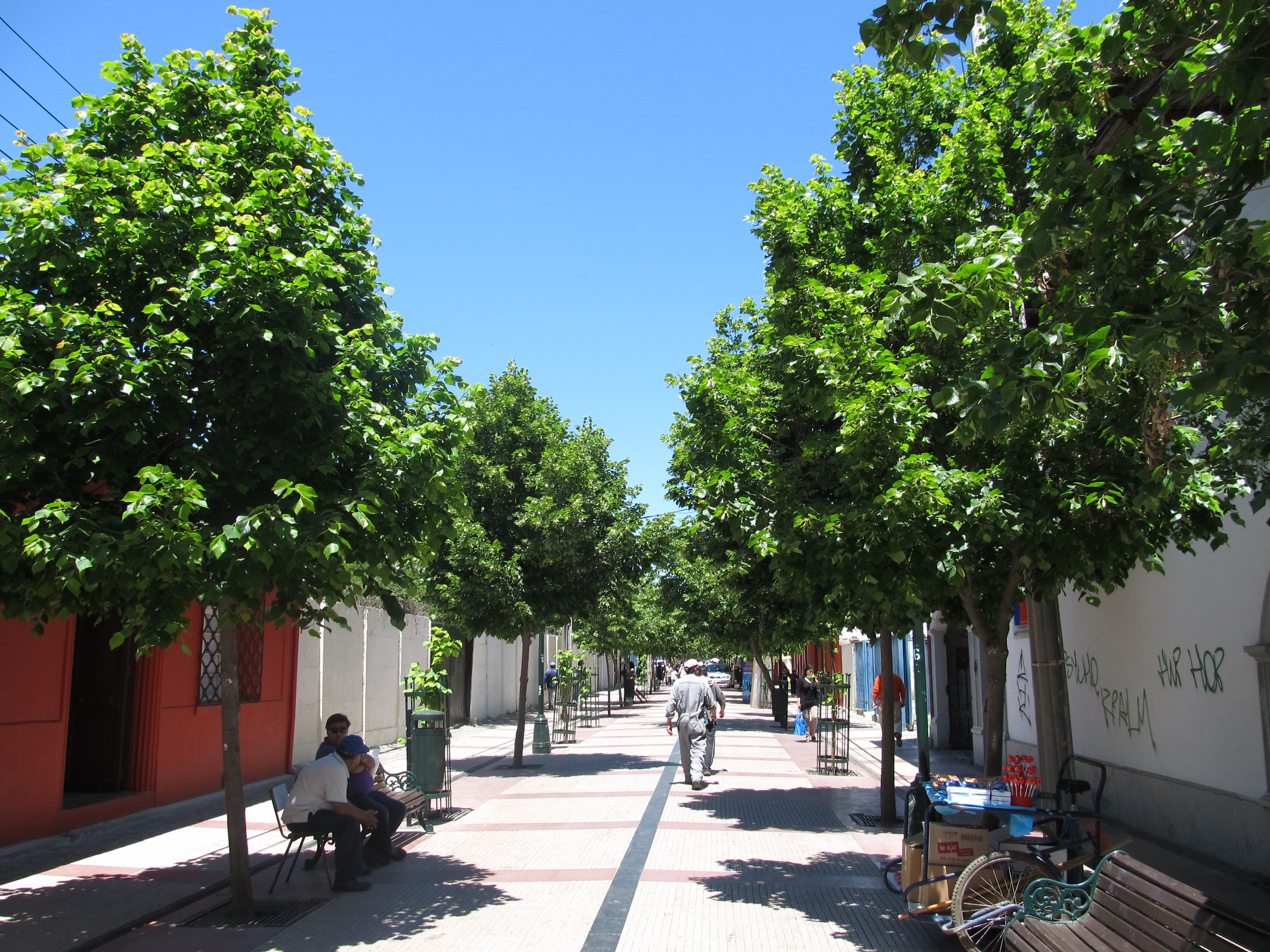 Calle Estado, Rancagua